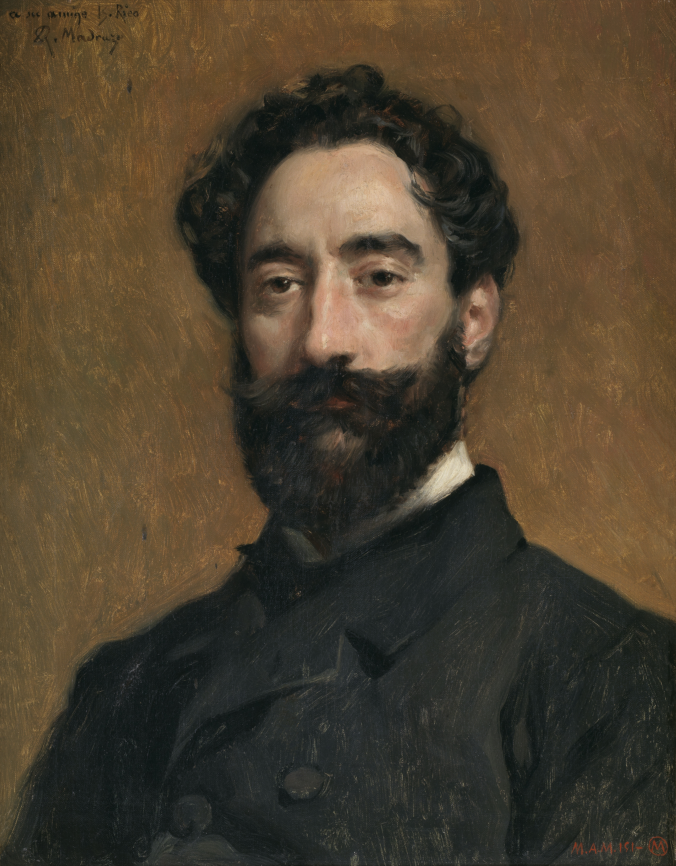 Retrato del grabador español Bernardo Rico y Ortega († 1894), que fue hermano del pintor Martín Rico.